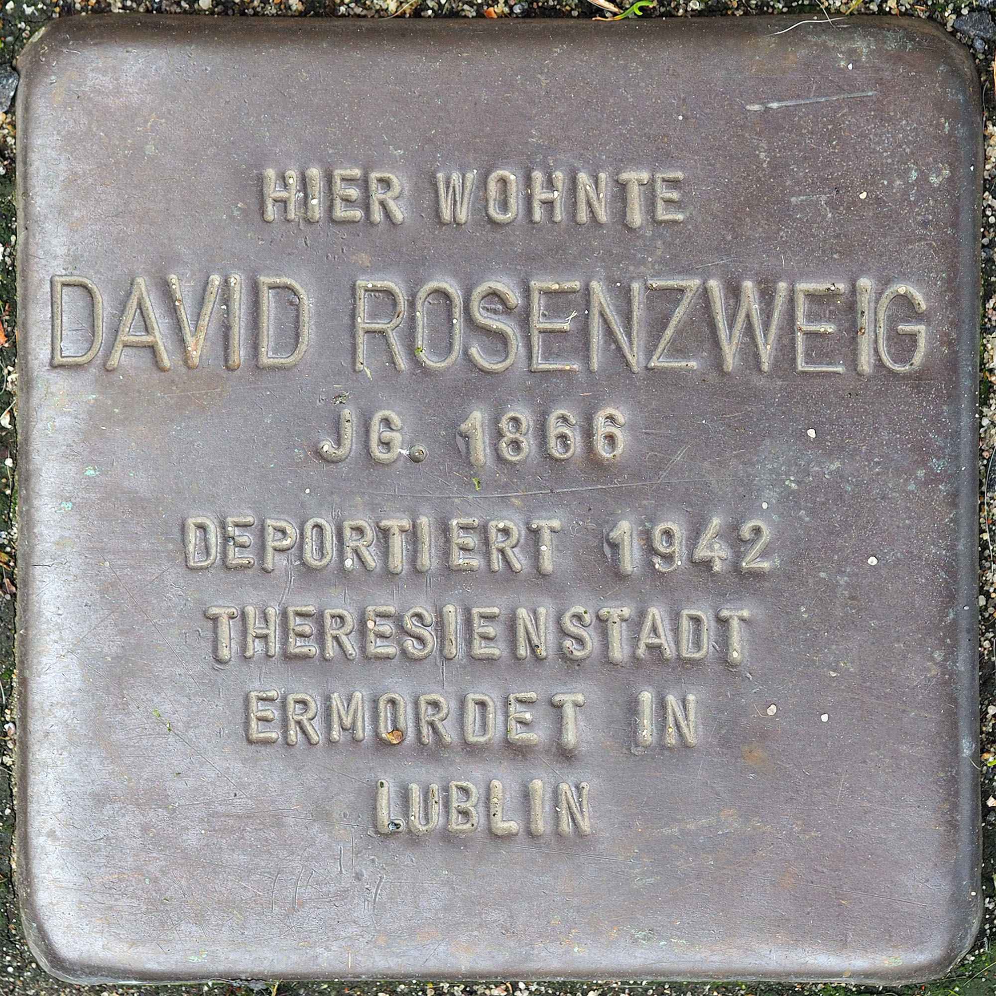 Stolpersteine MG: Rosenzweig, David